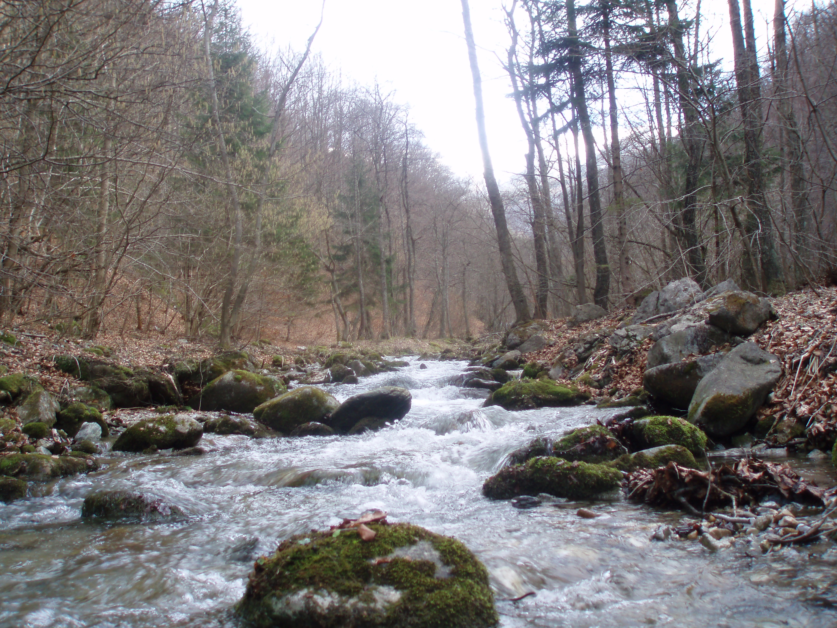 Beliansky potok, Slovakia